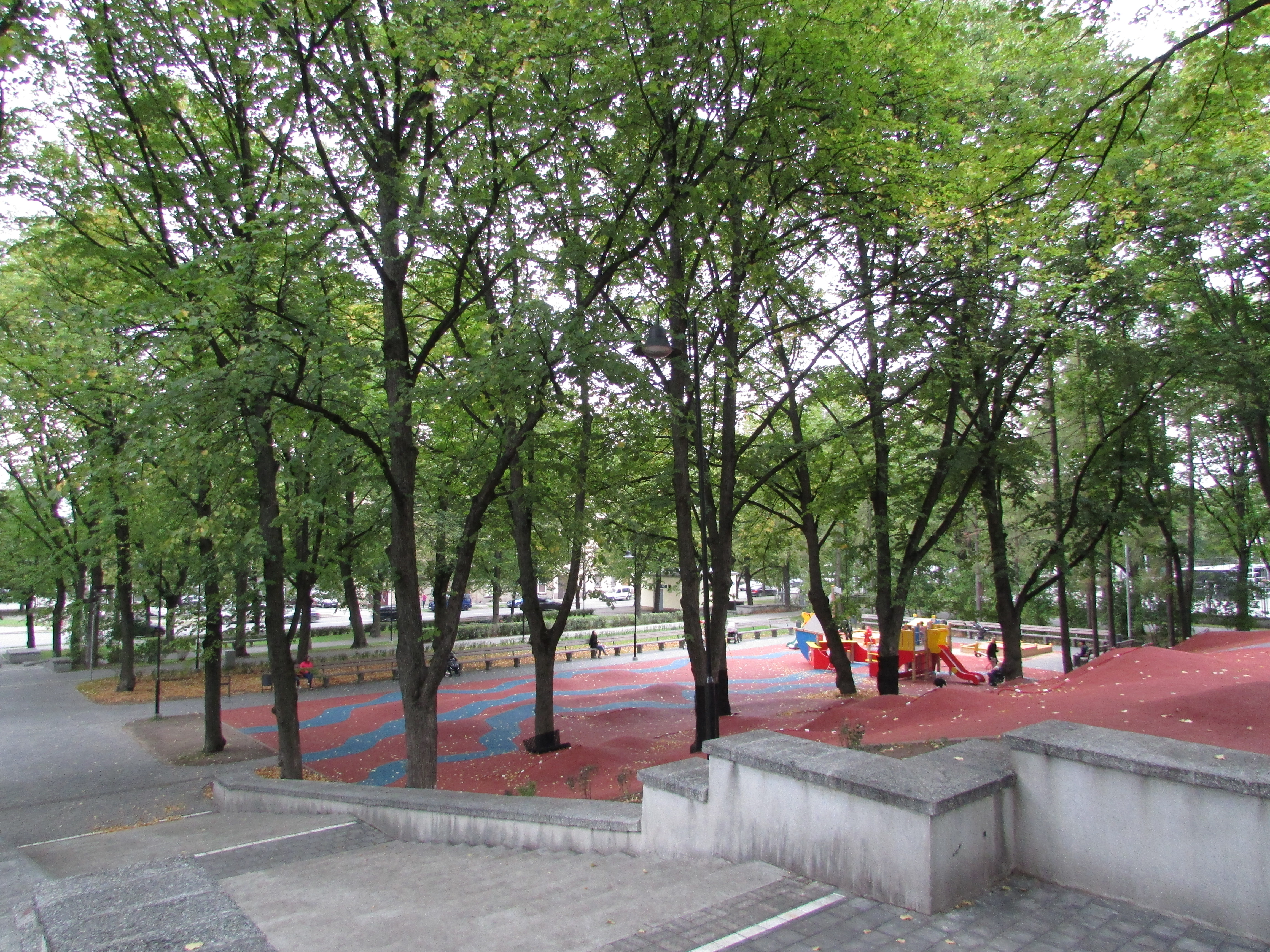 Grīziņkalna parks, Rīga, Pērnavas iela